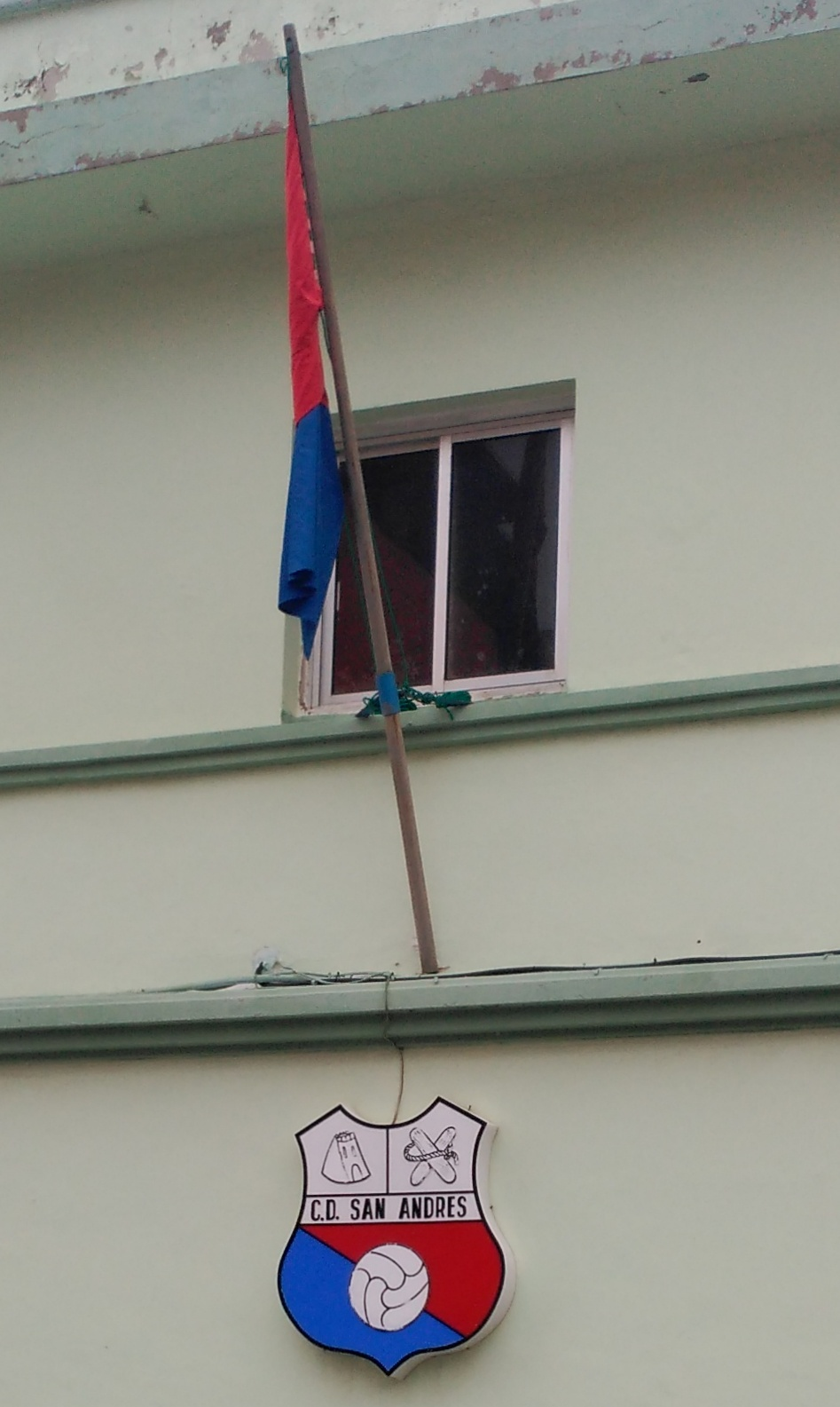 Bandera y escudo del Club Deportivo San Andrés en la sede del club